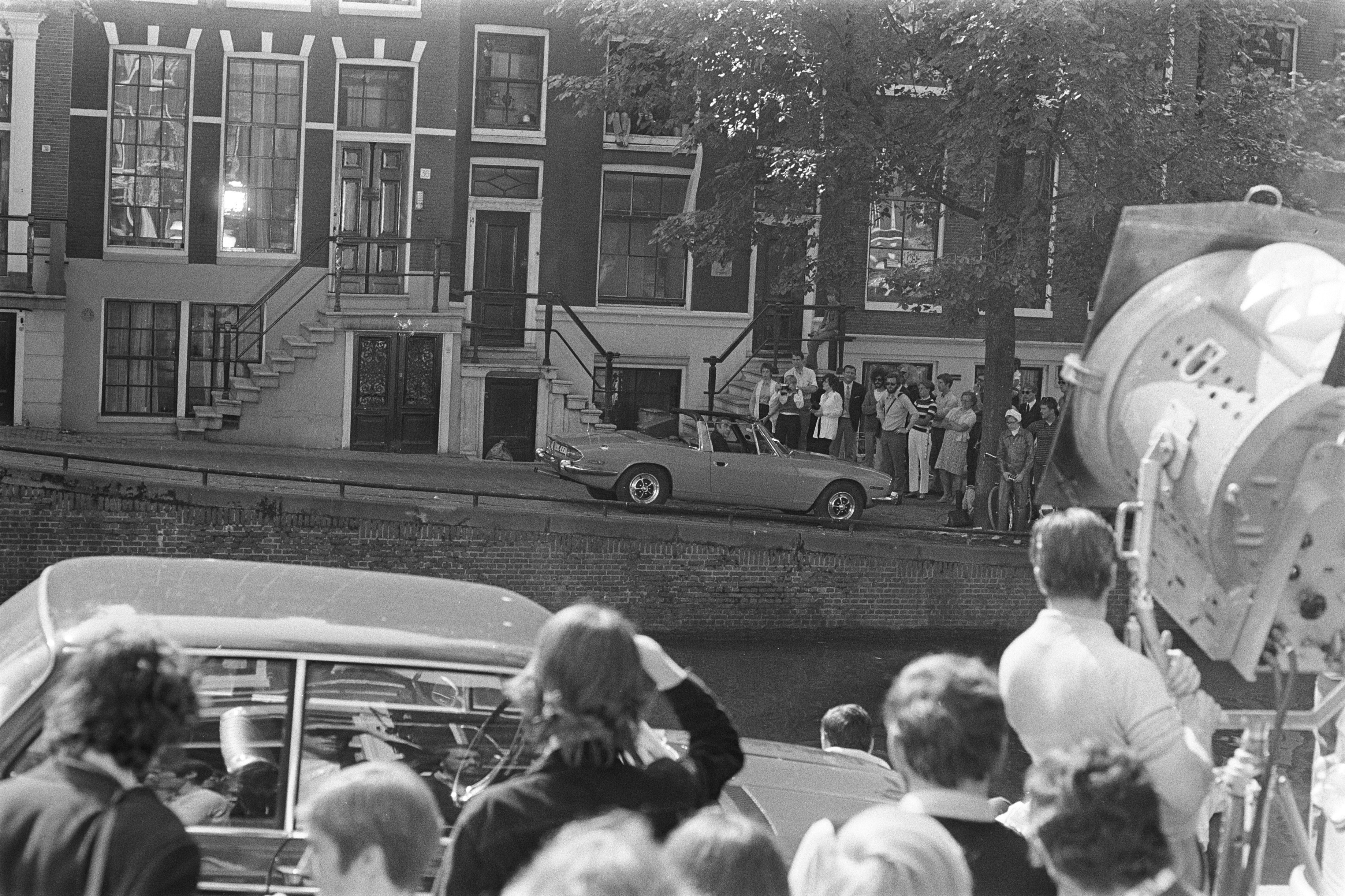 Sean Connery bei den Dreharbeiten für den James-Bond-Film Diamantenfieber an der Reguliersgracht in Amsterdam.